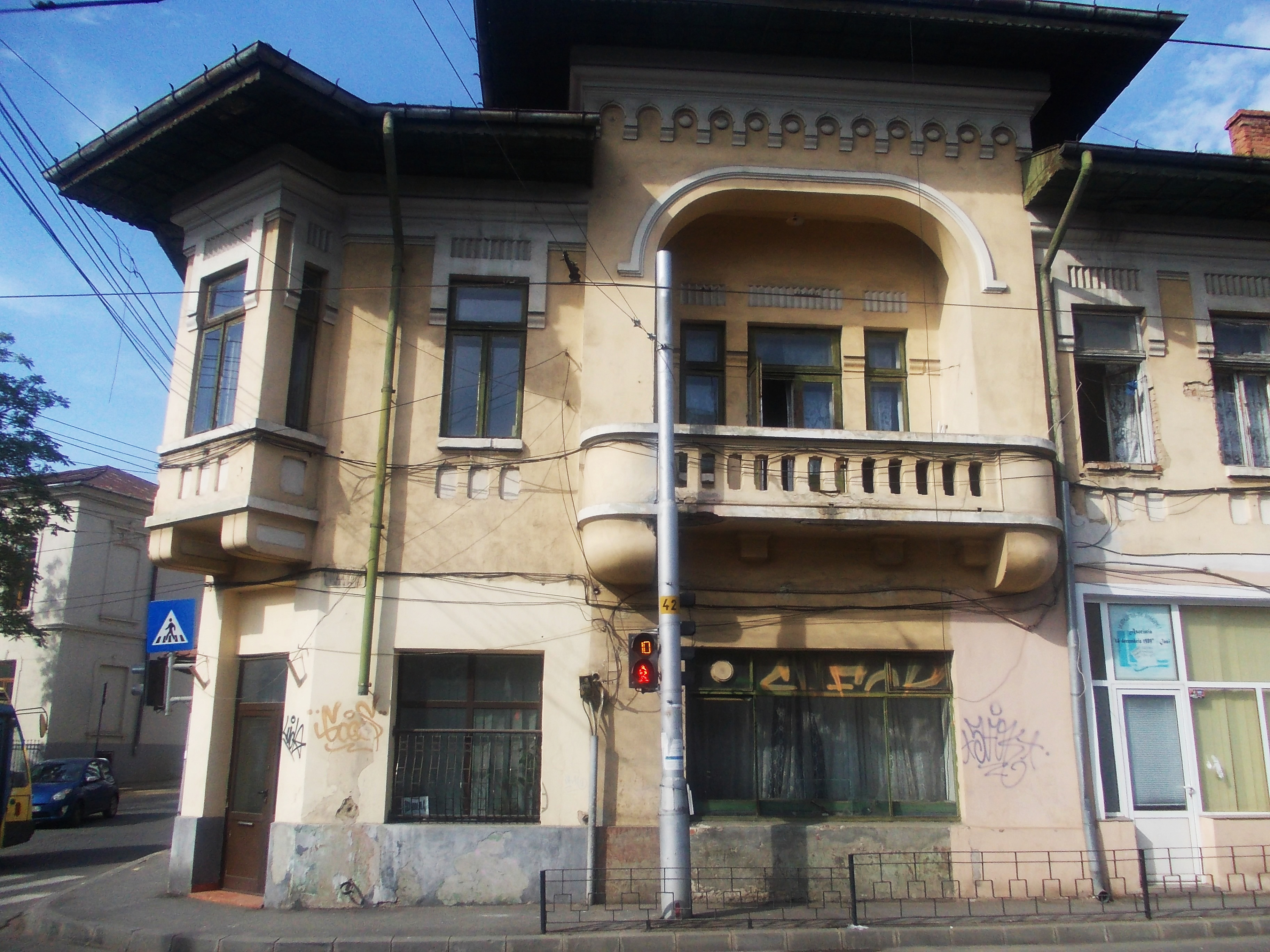 municipiul Iași, Str. Cuza Vodă 43